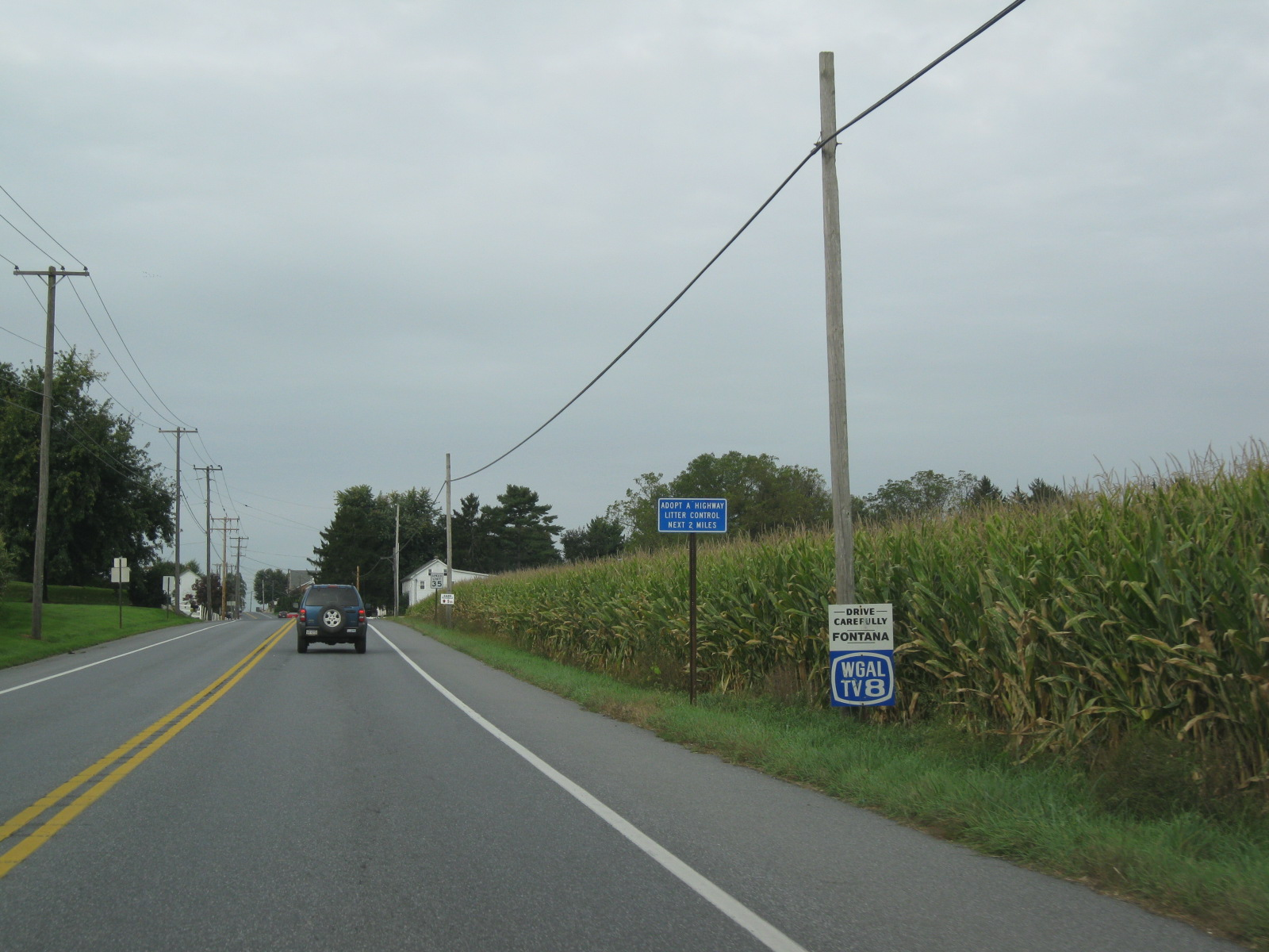 US Route 322 - Pennsylvania